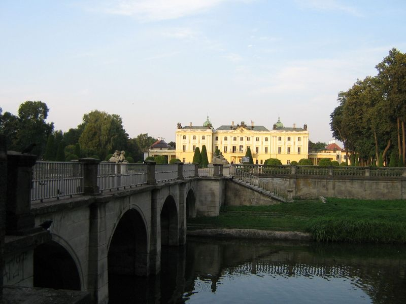 Pałac Branickich w Białymstoku